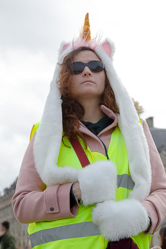 Les Gilets Jaunes